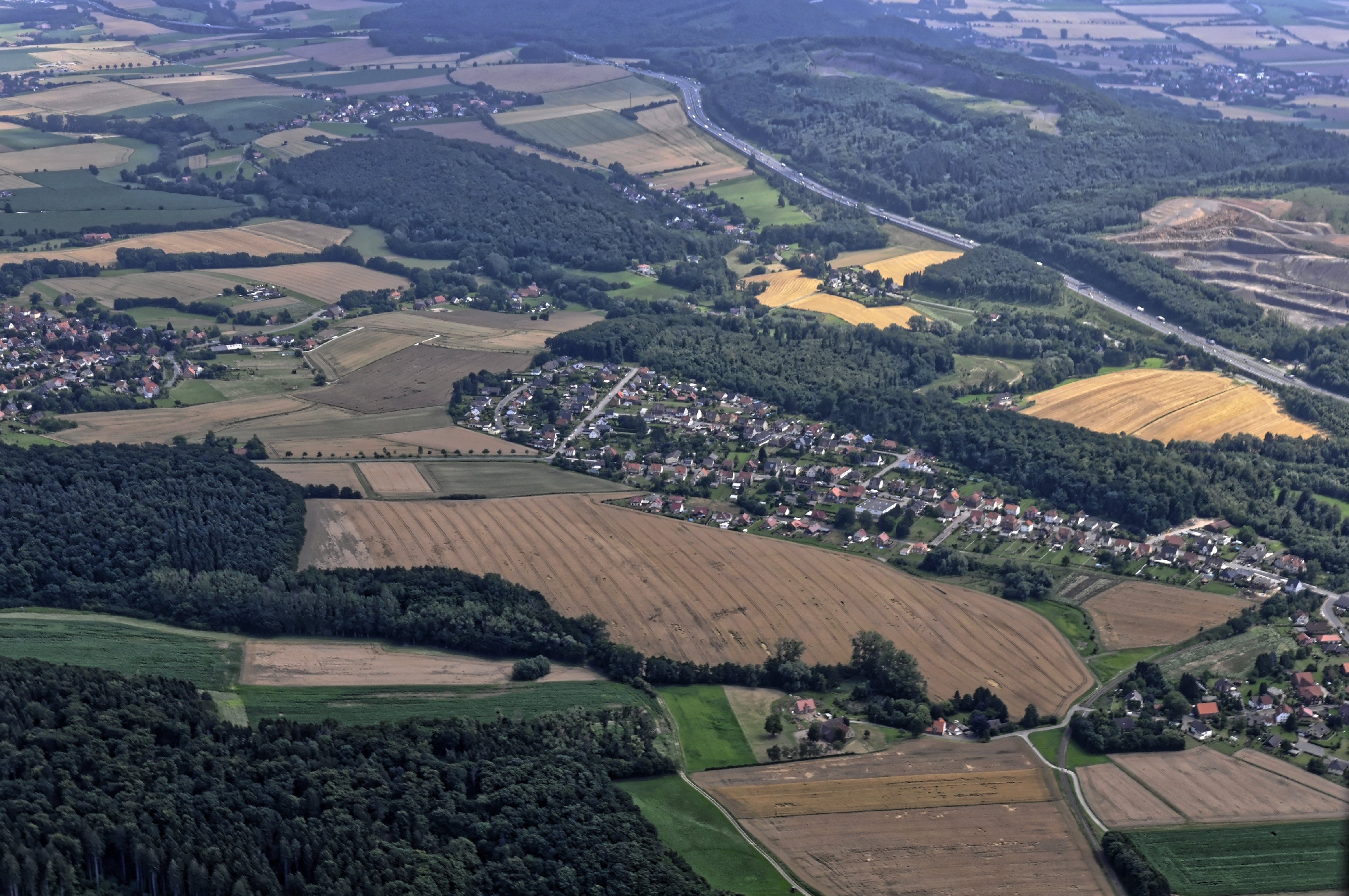 Bilder vom Flug Nordholz Hammelburg 2015